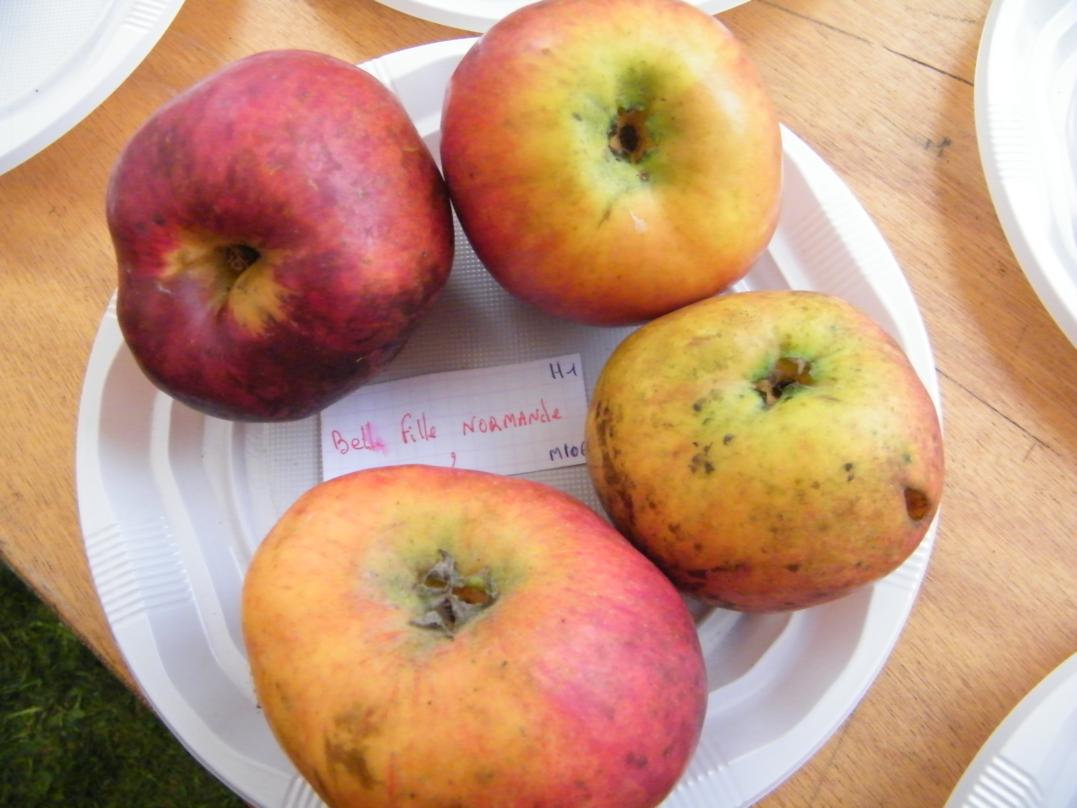 Belle Fille Normande, Mons-Boubert, Somme, Fr, expo du 29-10-2017 (30)